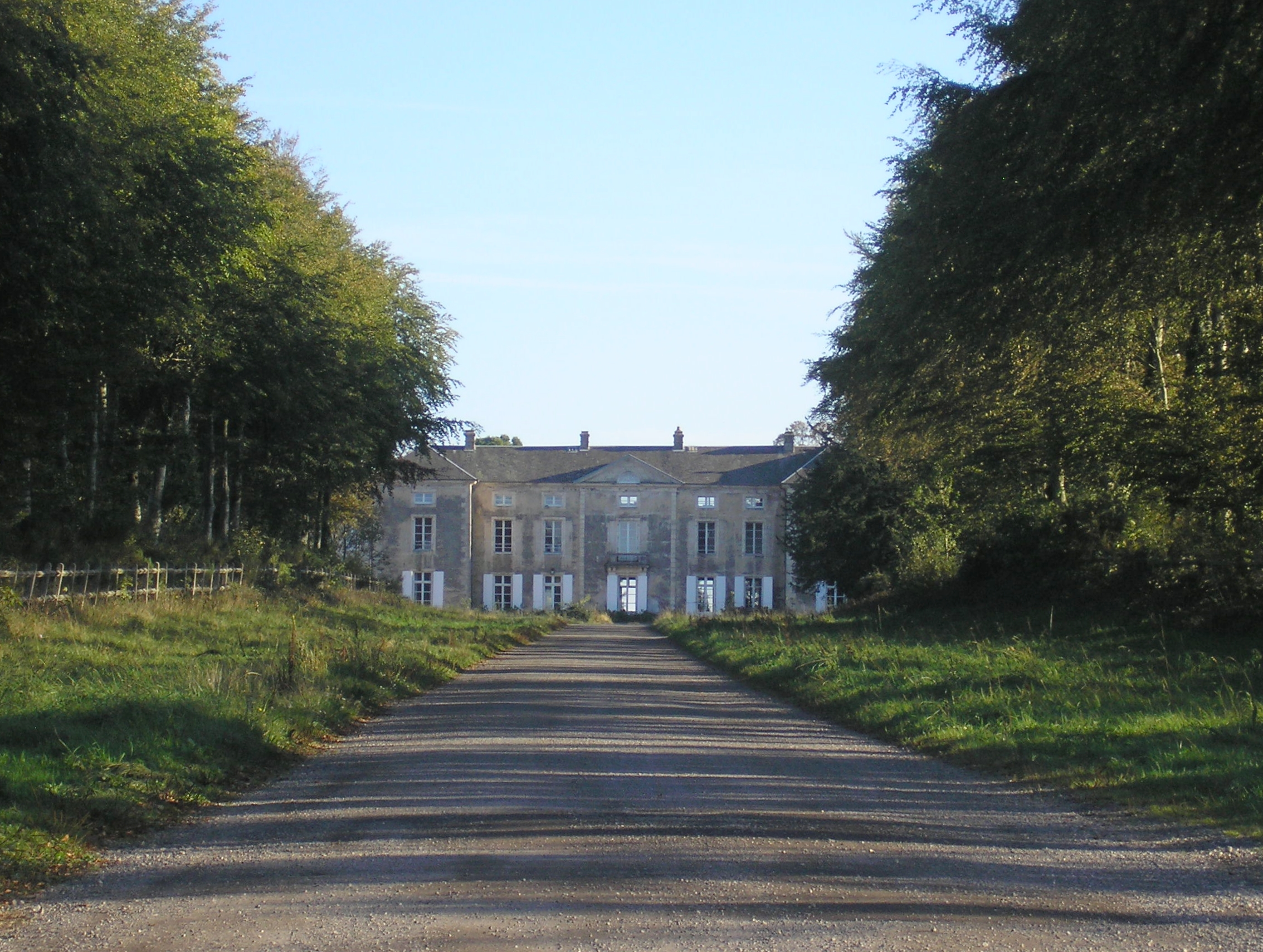 Saint-Pierre-du-Fresne (Normandie, France). Le château.